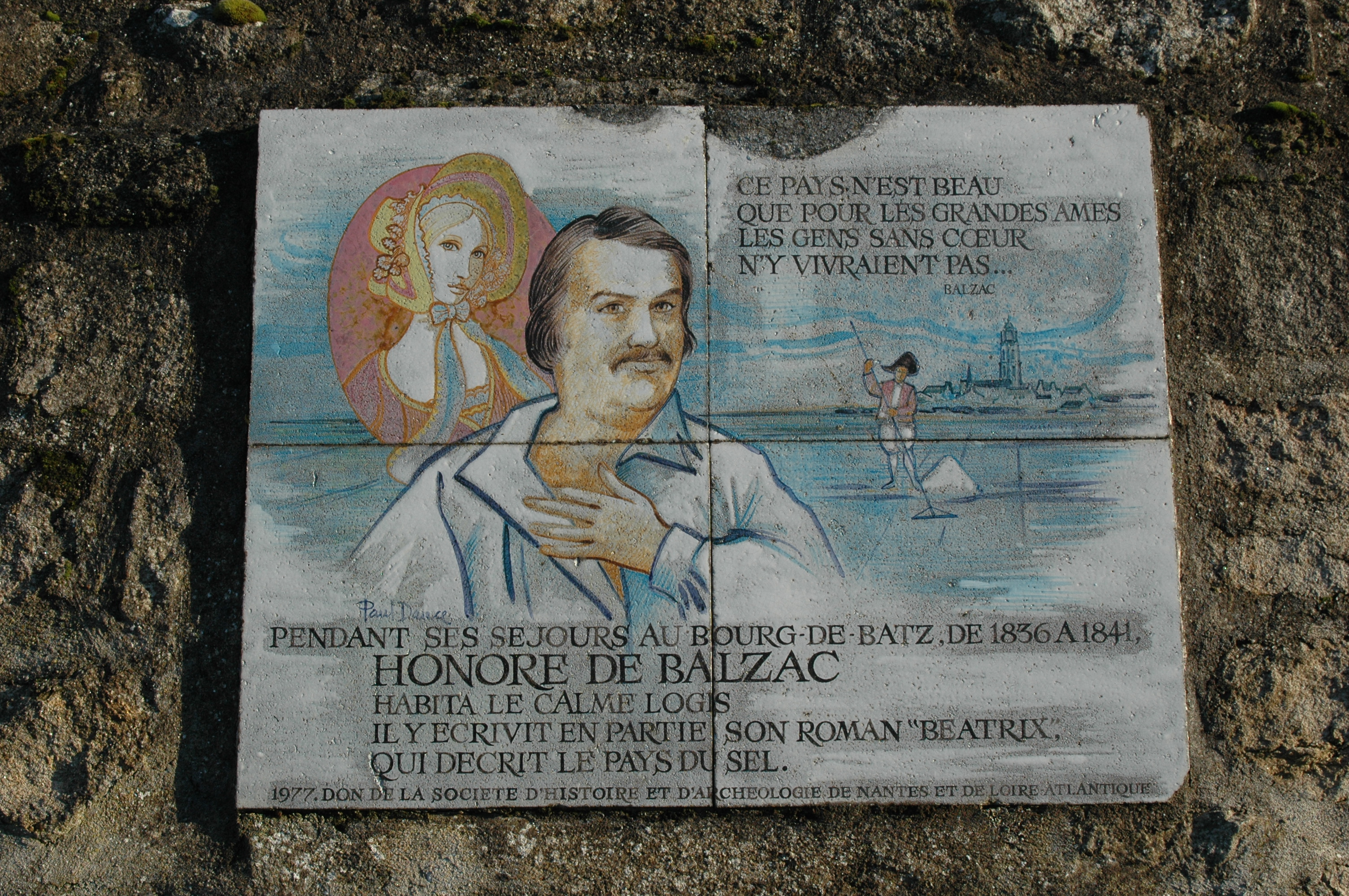 Batz-sur-Mer - Plaque sur le mur d'enceinte du Calme logis